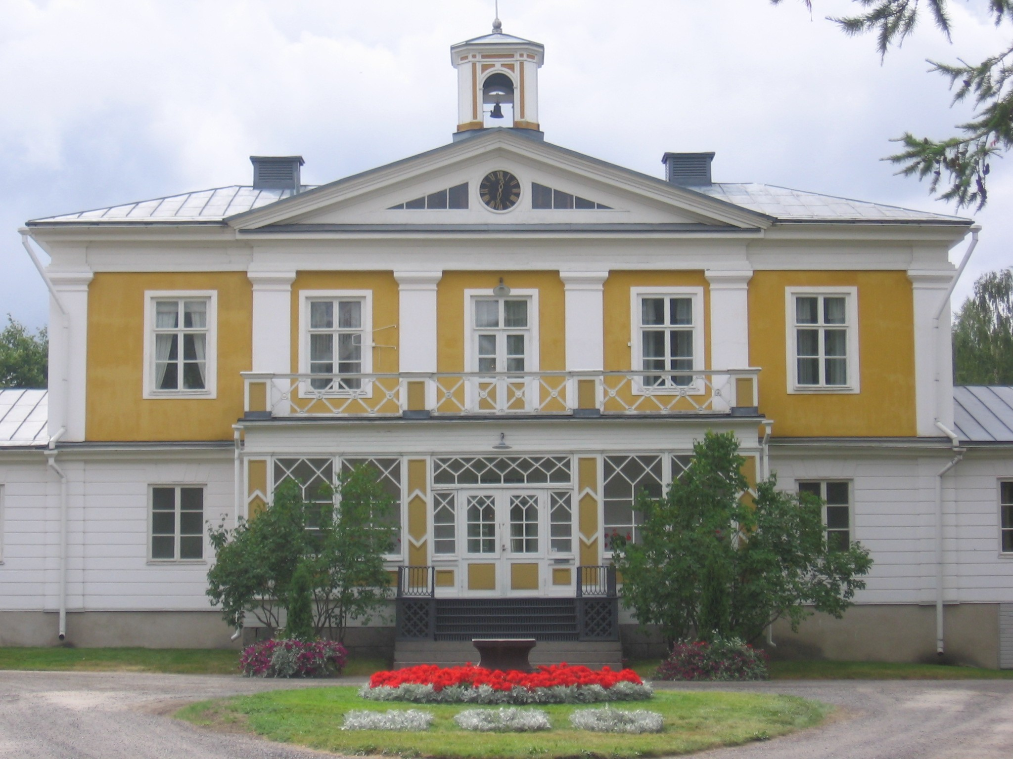 Törnävän kartano